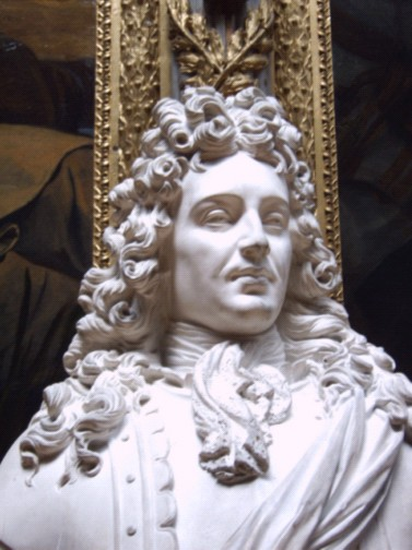 buste de la galerie des batailles du château de Versailles